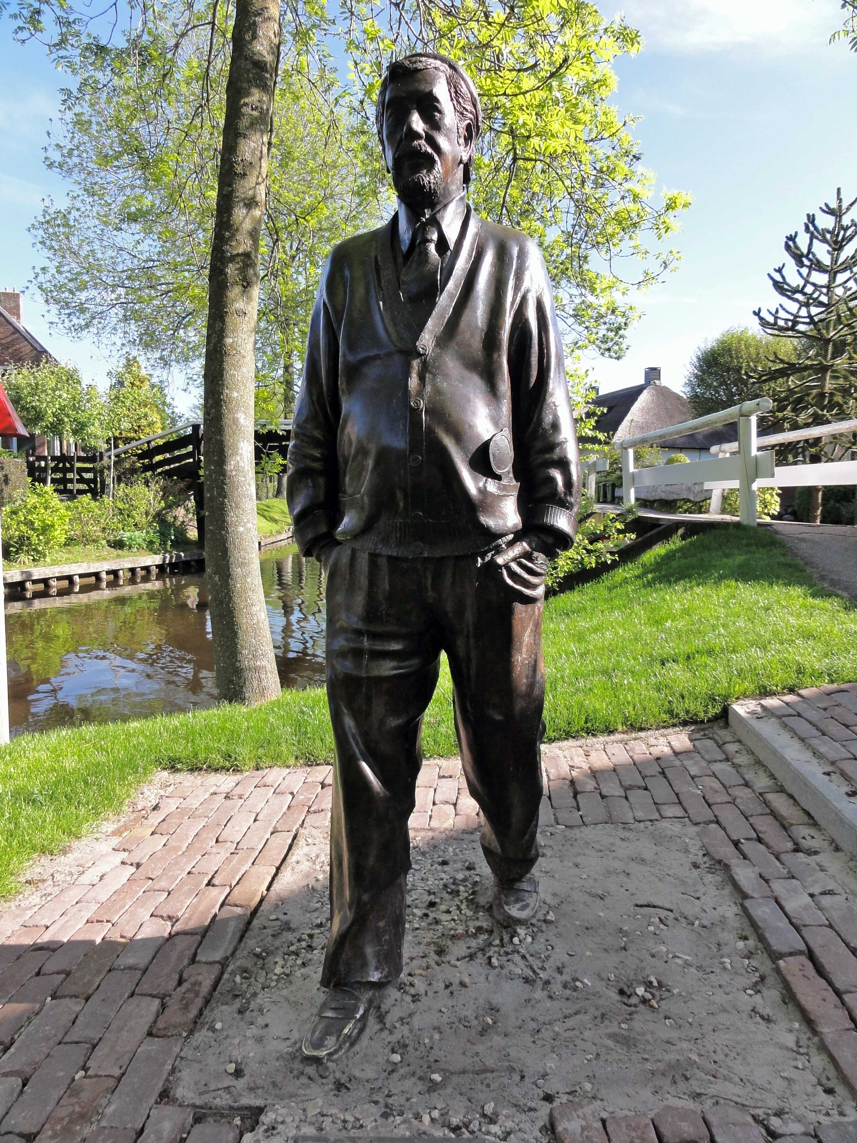 Beeld van Albert Mol (1917-2004) door Wim Kuijl aan het Binnenpad in Giethoorn